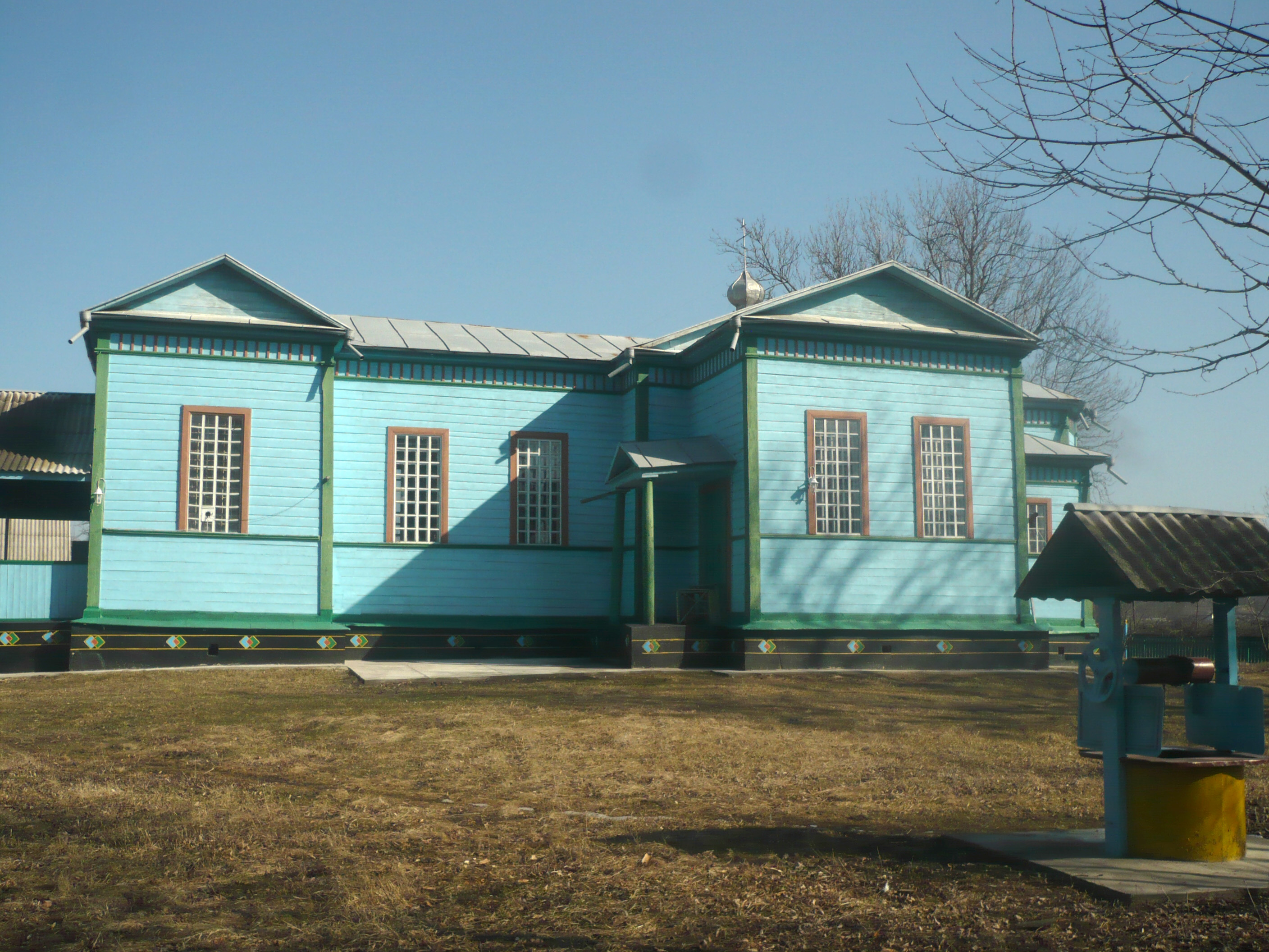 В 1748 році в селі Купчинці (Іллінецький р-н, Вінницька обл) збудовано Покровську церкву, дерев’яну 5-го класу. Їй належало 91 десятина землі